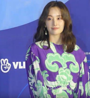 5월 1일 오후 서울시 강남구 삼성동 코엑스에서 제 55회 백상예술대상 시상식 레드카펫 행사가 열렸다.